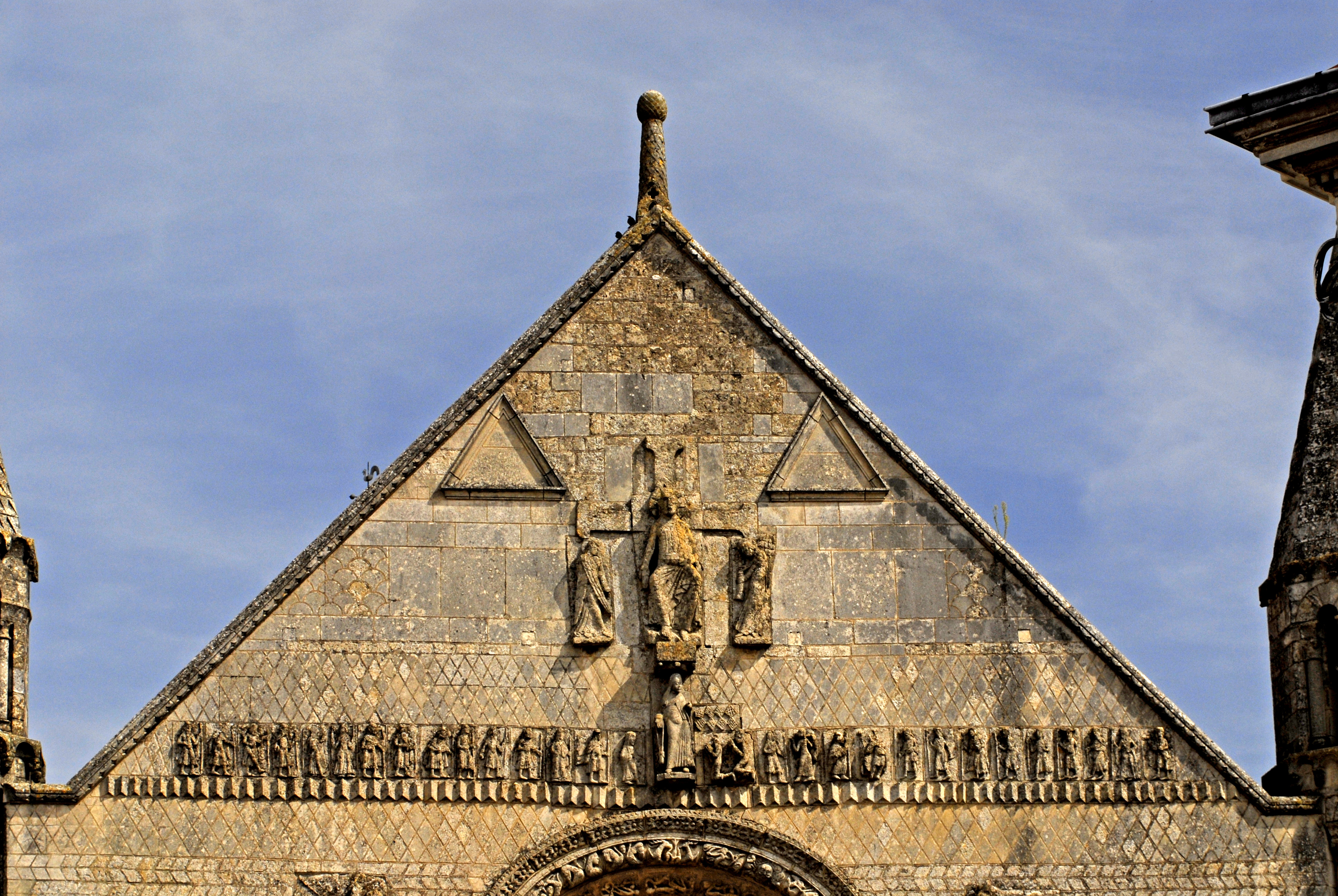 Saint-Jouin-de-Marnes, Giebelfeld